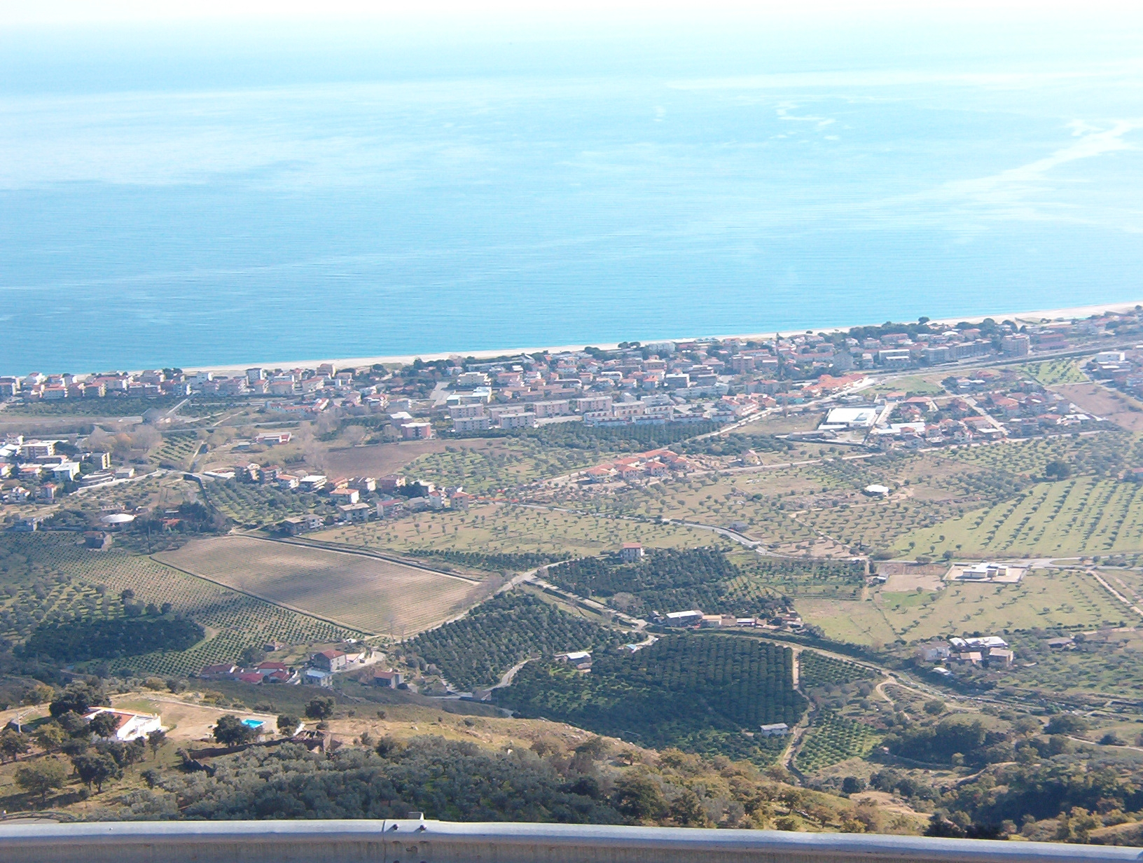 Panorama Montepaone, Autor Matteo Marascio